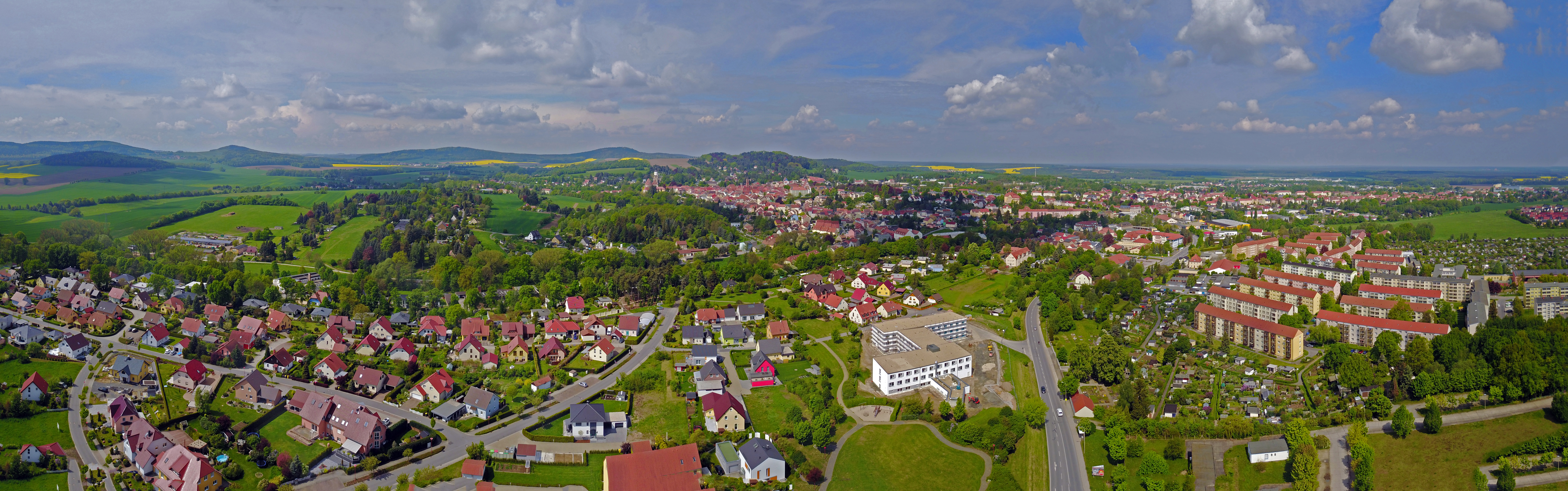 Kamenz, 100 m über der Hohen Straße, Blick Richtung Stadtzentrum, hinter dem Stadtzentrum genau in der Mitte befindet sich der Hutberg Hornjoserbsce: Kamjenc, sto metrow nad Wysokej dróhu, napohlad do směra nutřkowneho města, z Pastwinej horu w pozadku